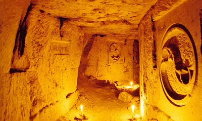 Lieu dit "La crypte" carrières de Paris XIV - (Utilisateur Raoudoudou) Édouard BERGÉ (c) 2001 Photo argentique en pause longue (20s) avec éclairage bougies. Permission vous est donnée de copier, distribuer et/ou modifier ce document selon les termes de la Licence GNU Free Documentation License, Version 1.2 ou ultérieure publiée par la Free Software Foundation